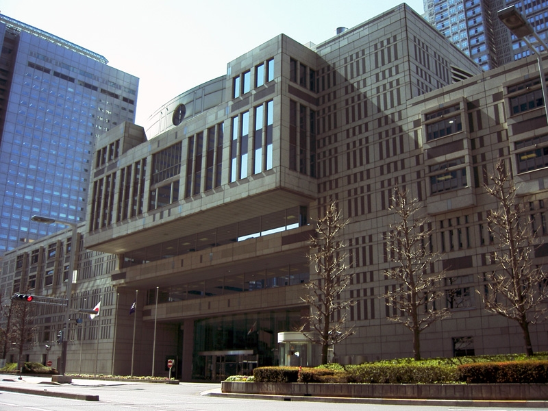 Tokyo_togikai_Building_Shinjuku Tokyo Japan